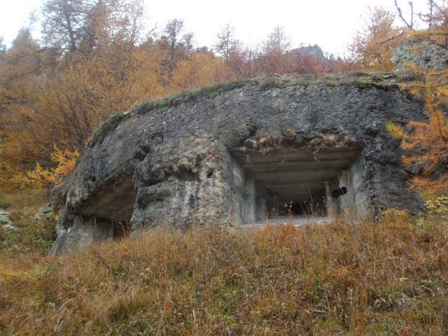 Opera 11 Becco Rosso